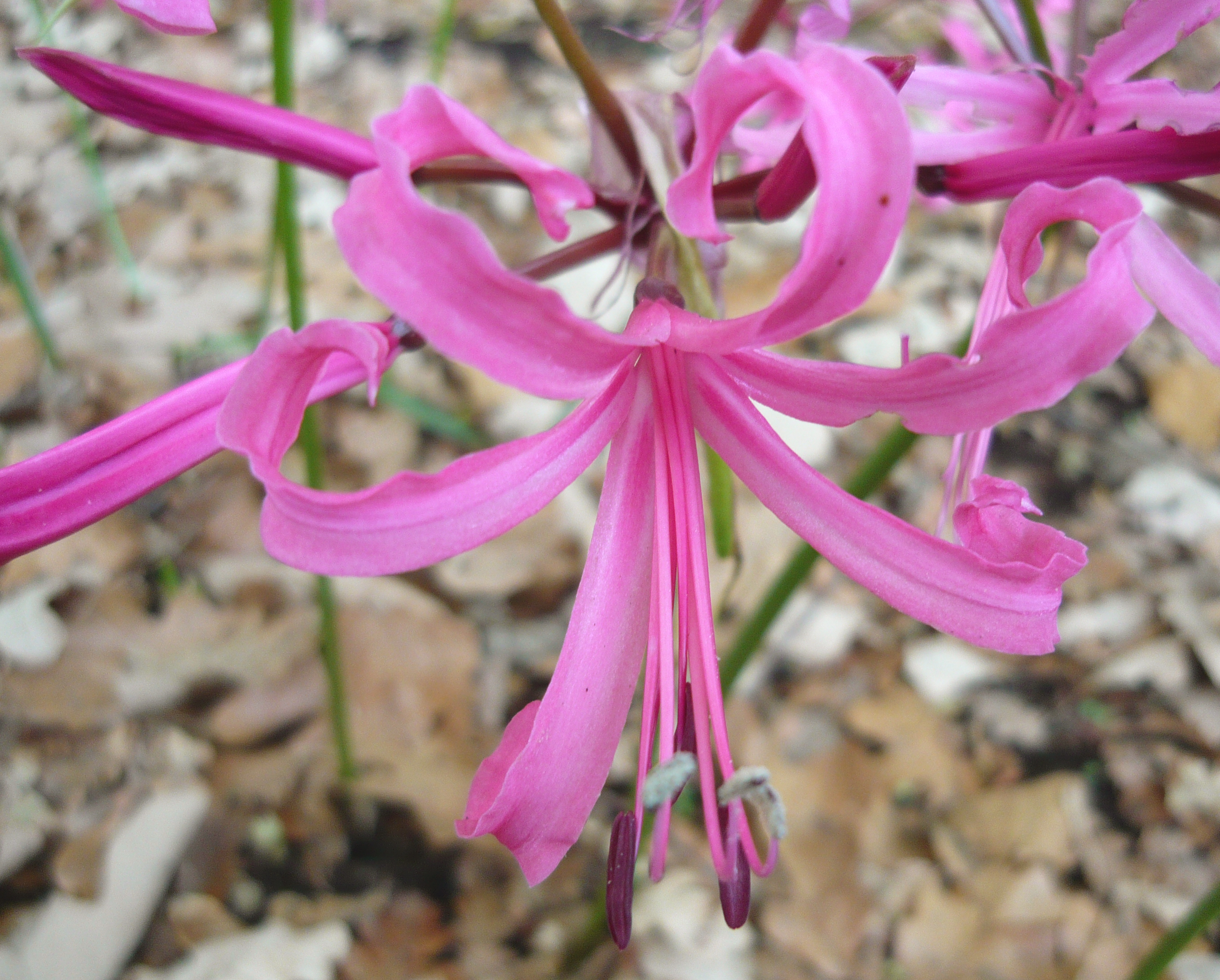 Nerine bowdenii. Real Jardín Botánico de Madrid